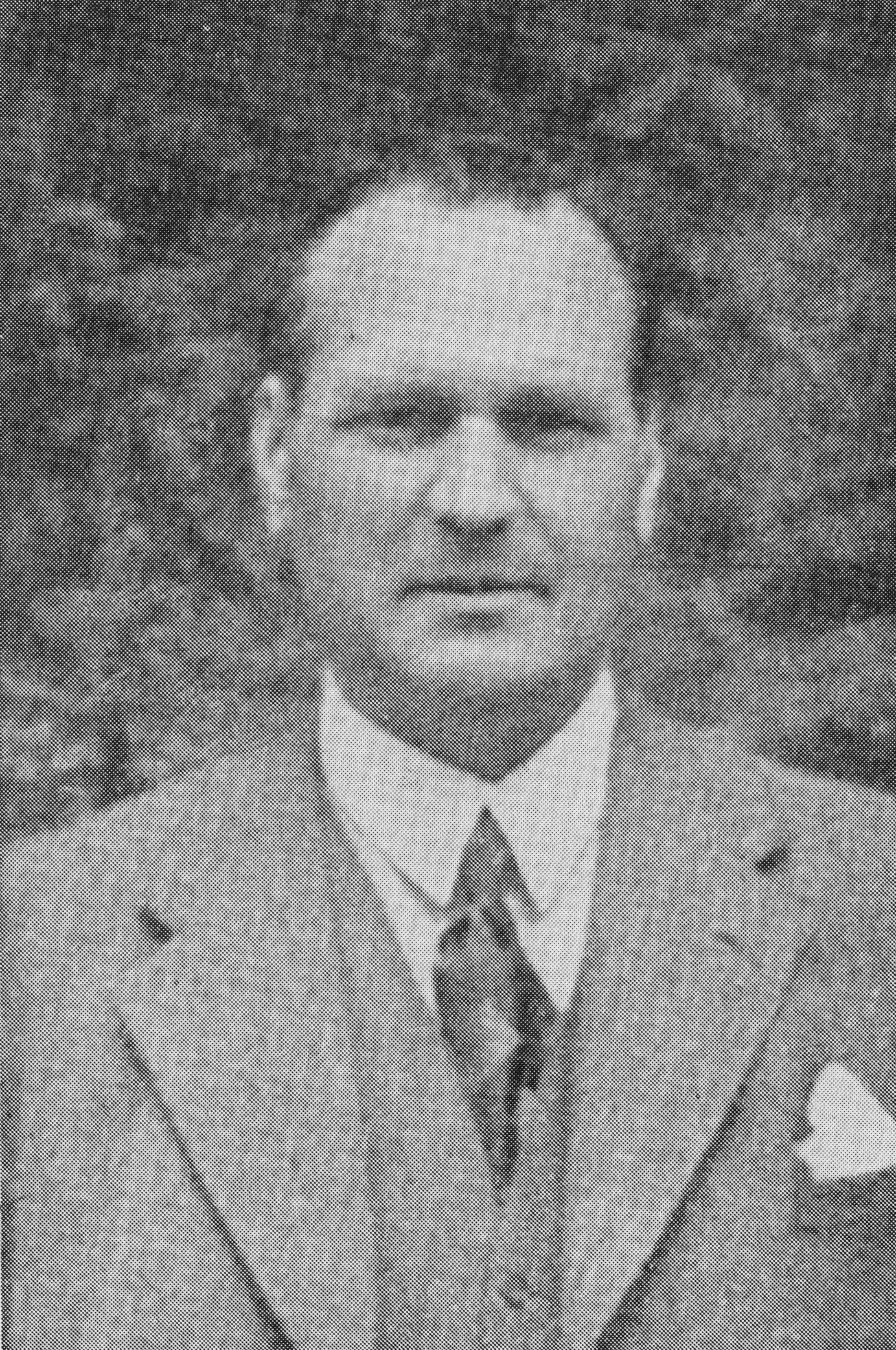 Professor Bruno Lesch.